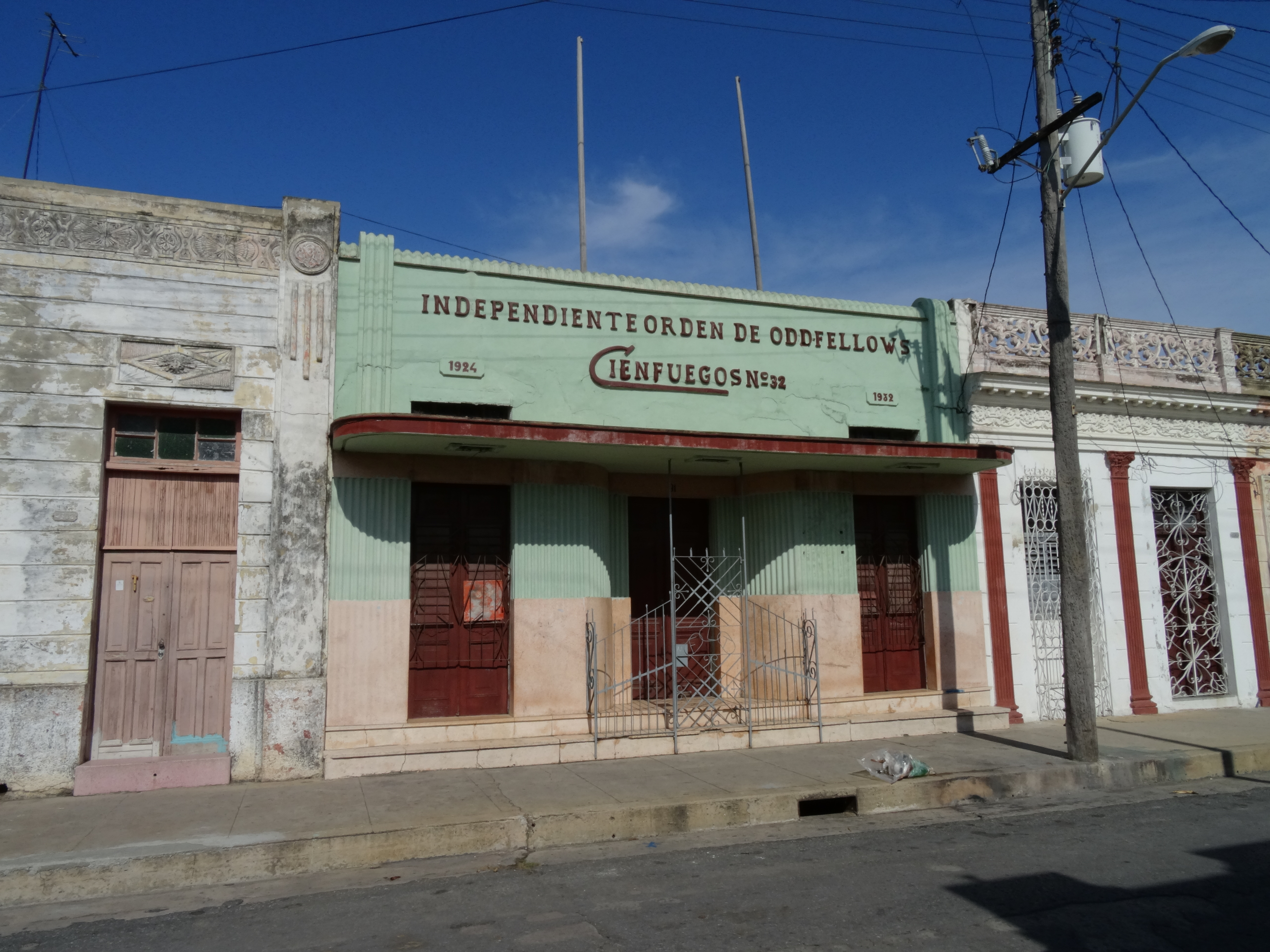 Kuba, Cienfuegos Loża masońska Independiente Orden de Oddfellows